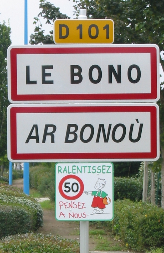 Bilingual signage, Le Bono, Brittany (France)